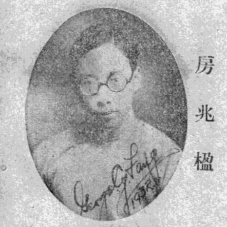 中文（台灣）: 《民國名人圖鑑》肖像